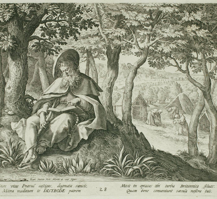 St. Disibod mit Gefährten und Landschaft, Stich von Raphael Sadeler 1594, nach Gemälde von Marten de Vos